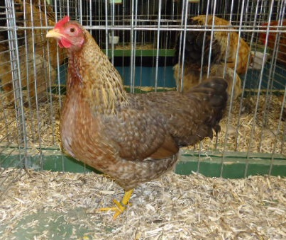 Poule Bielefelder, ou de Bielefeld, coucou doré clair naine